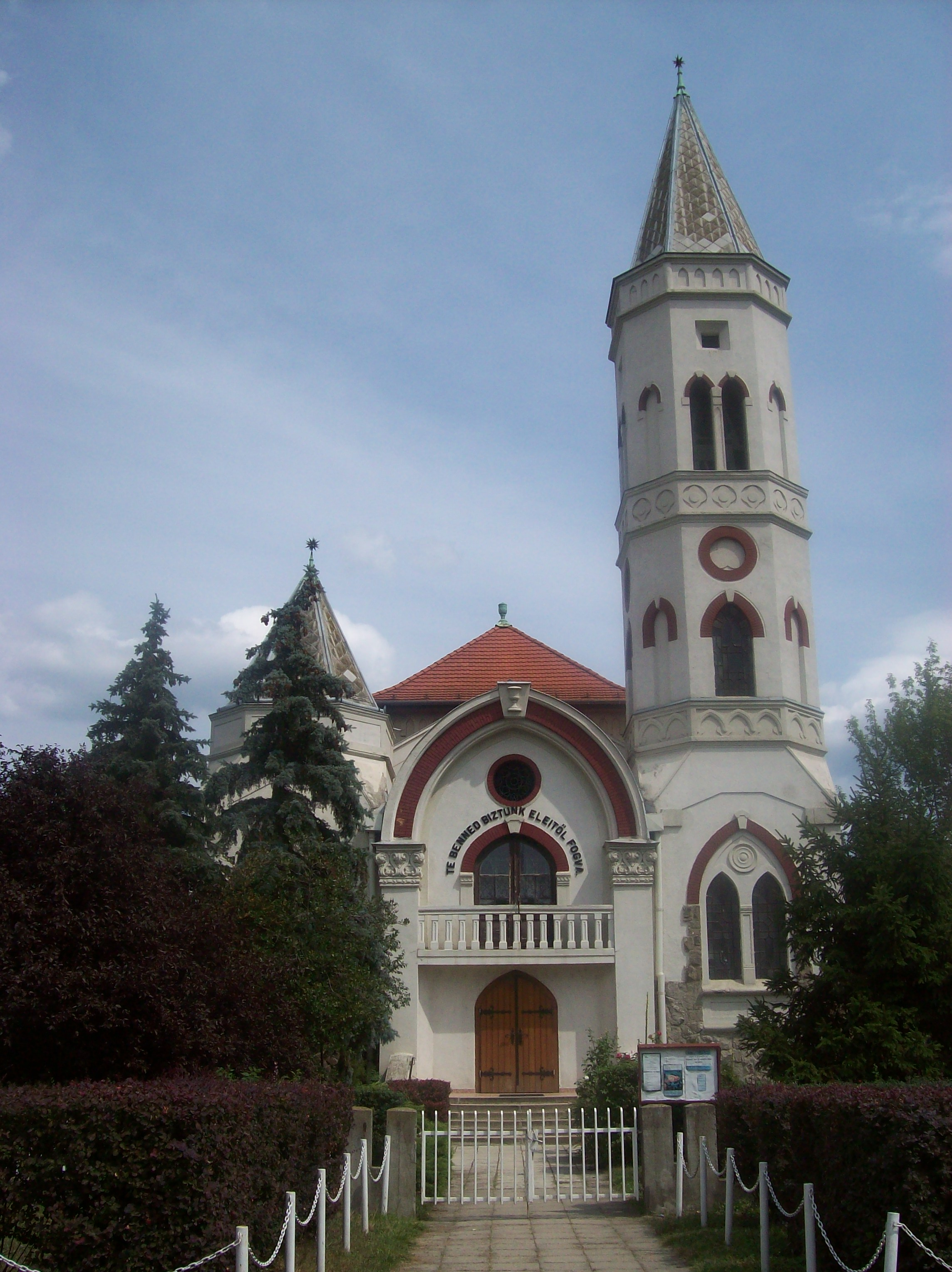 A budafoki református templom (Budapest, XXI. ker.)